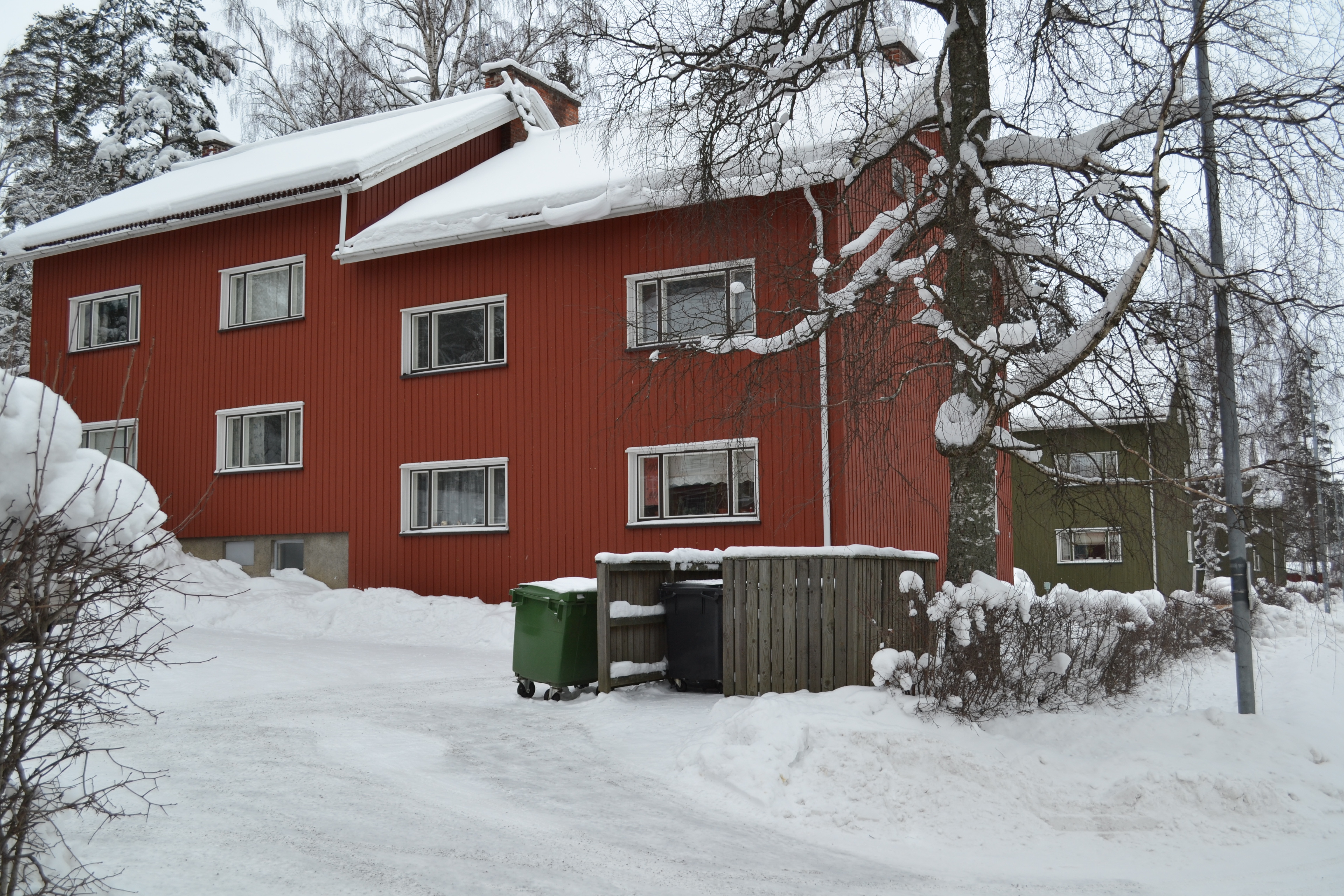 Kerrostaloja Kypärätiellä Jyväskylässä